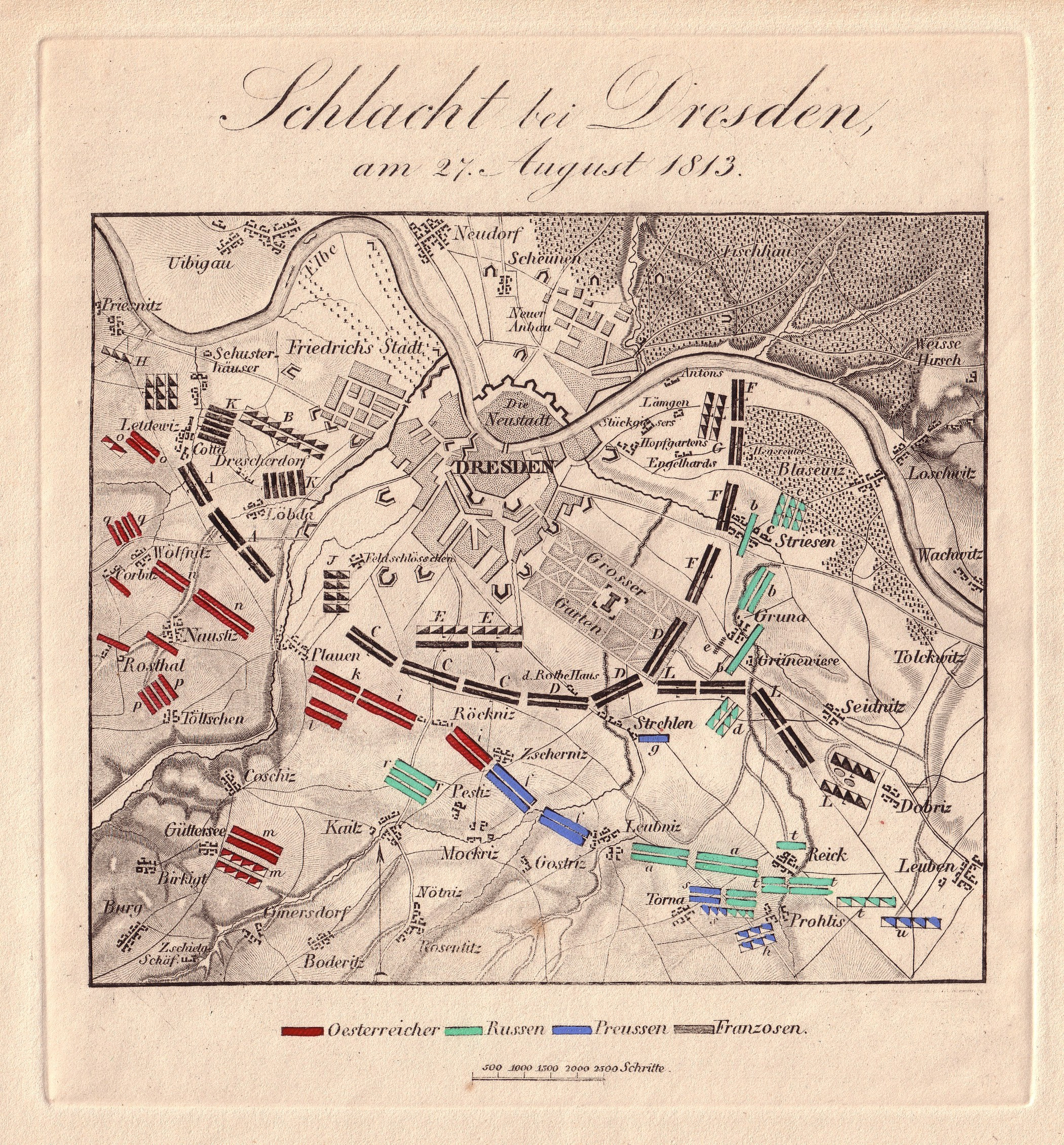 Militärische Situation der Schlacht bei Dresden am 27. August 1813. Teilkolorierter Kupferstich.